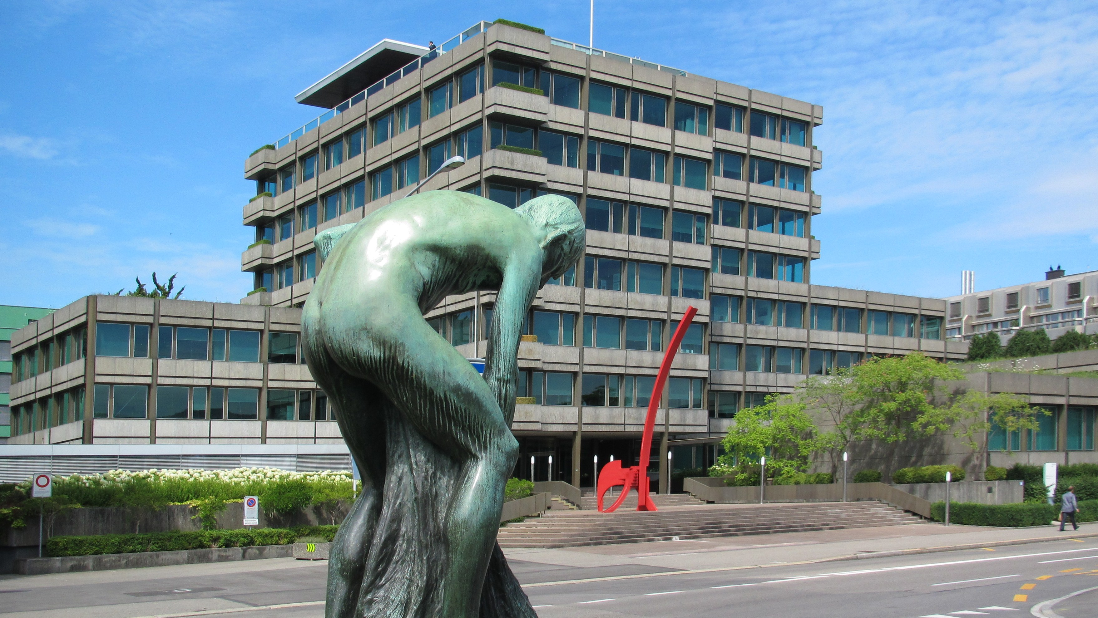 Zürich, Swiss Re, Swiss Reinsurance Compagny, Firmenarchiv, Mythenquai 50